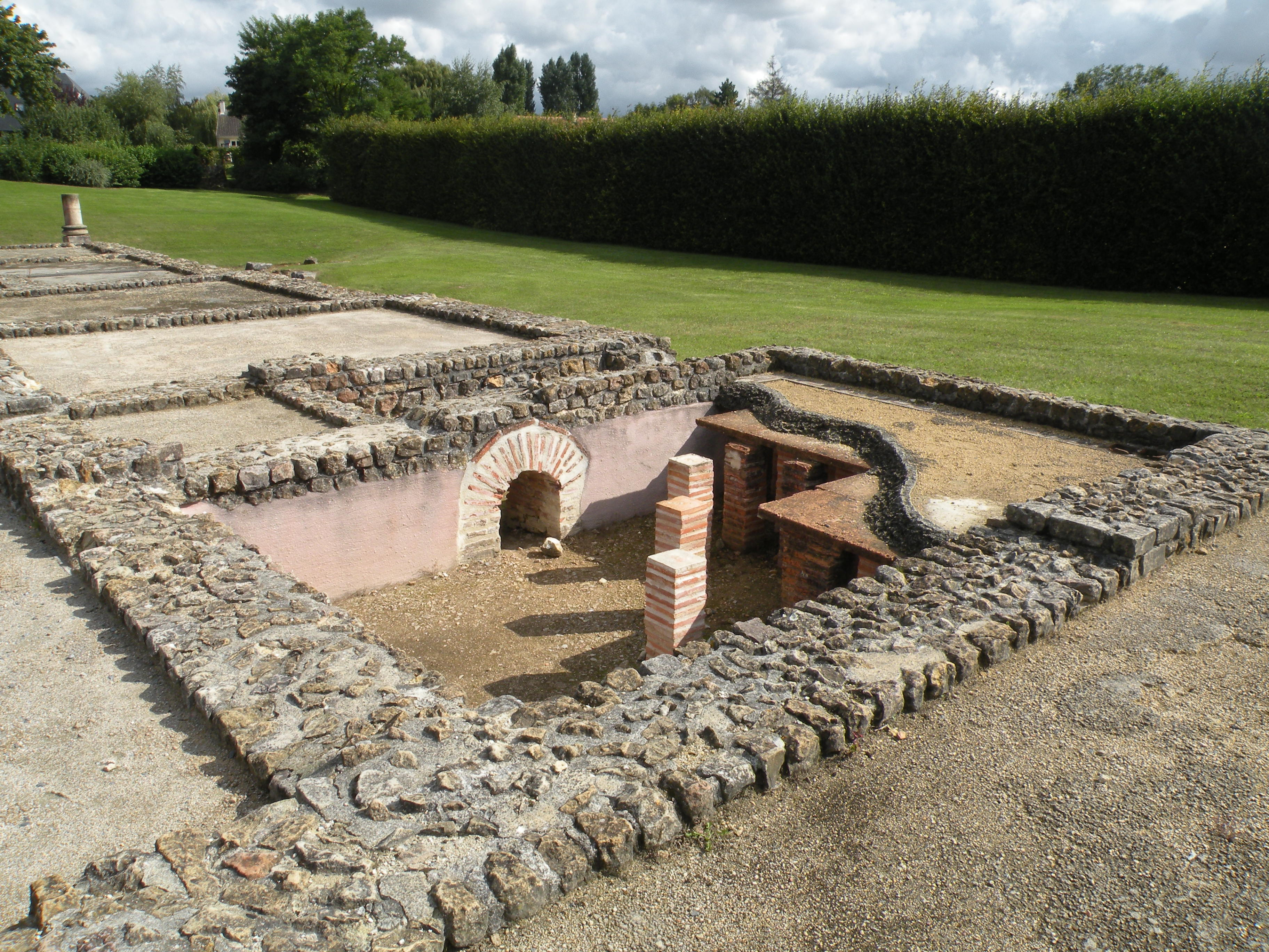 Vestiges de la salle d'hypocauste dans l'aile Est de la maison au Grand Péristyle à Vieux-la-Romaine (Calvados, Normandie, France).